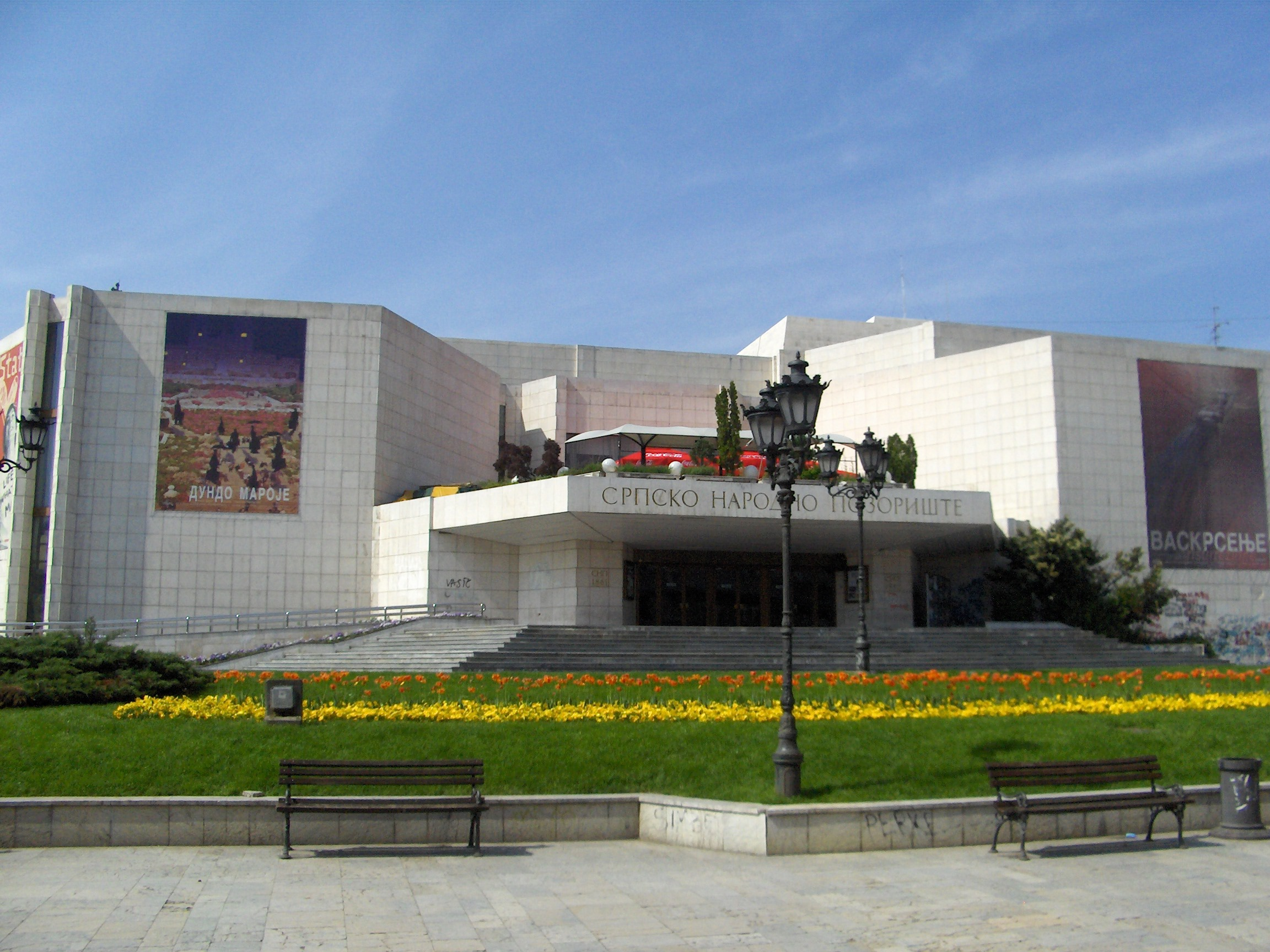 Srpsko Narodno Pozoriste_NS